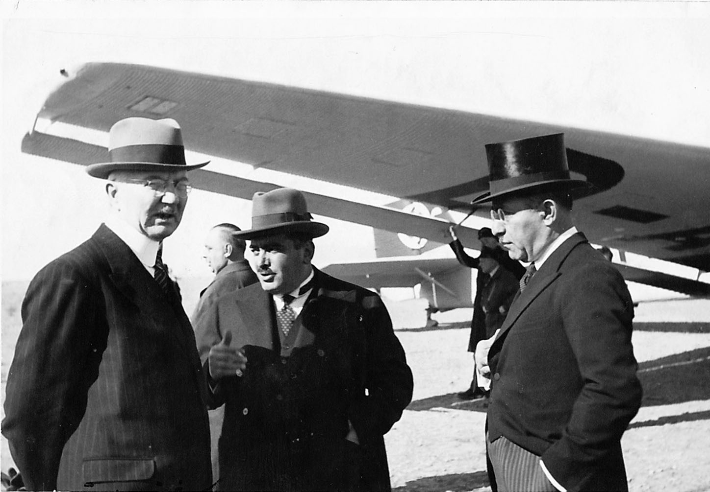 Reichsbankpräsident Hjalmar Schacht (links) zu Besuch in Teheran; Präsident der iranischen Nationalbank; Wirtschaftsminister Ali-Akbar Davar